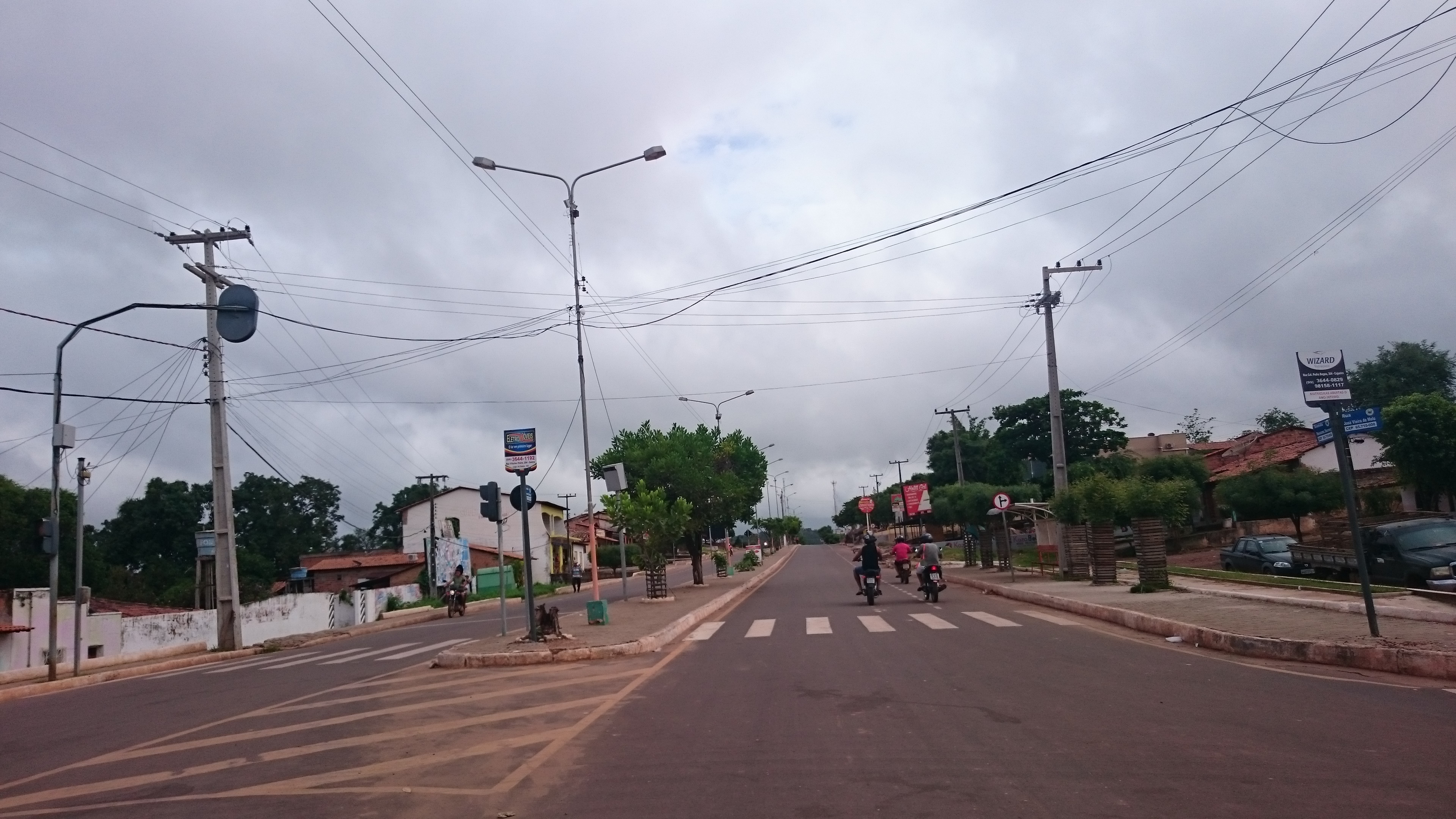 Av. Roseana Sarney, bairro Vila Rocha em Lago da Pedra - MA